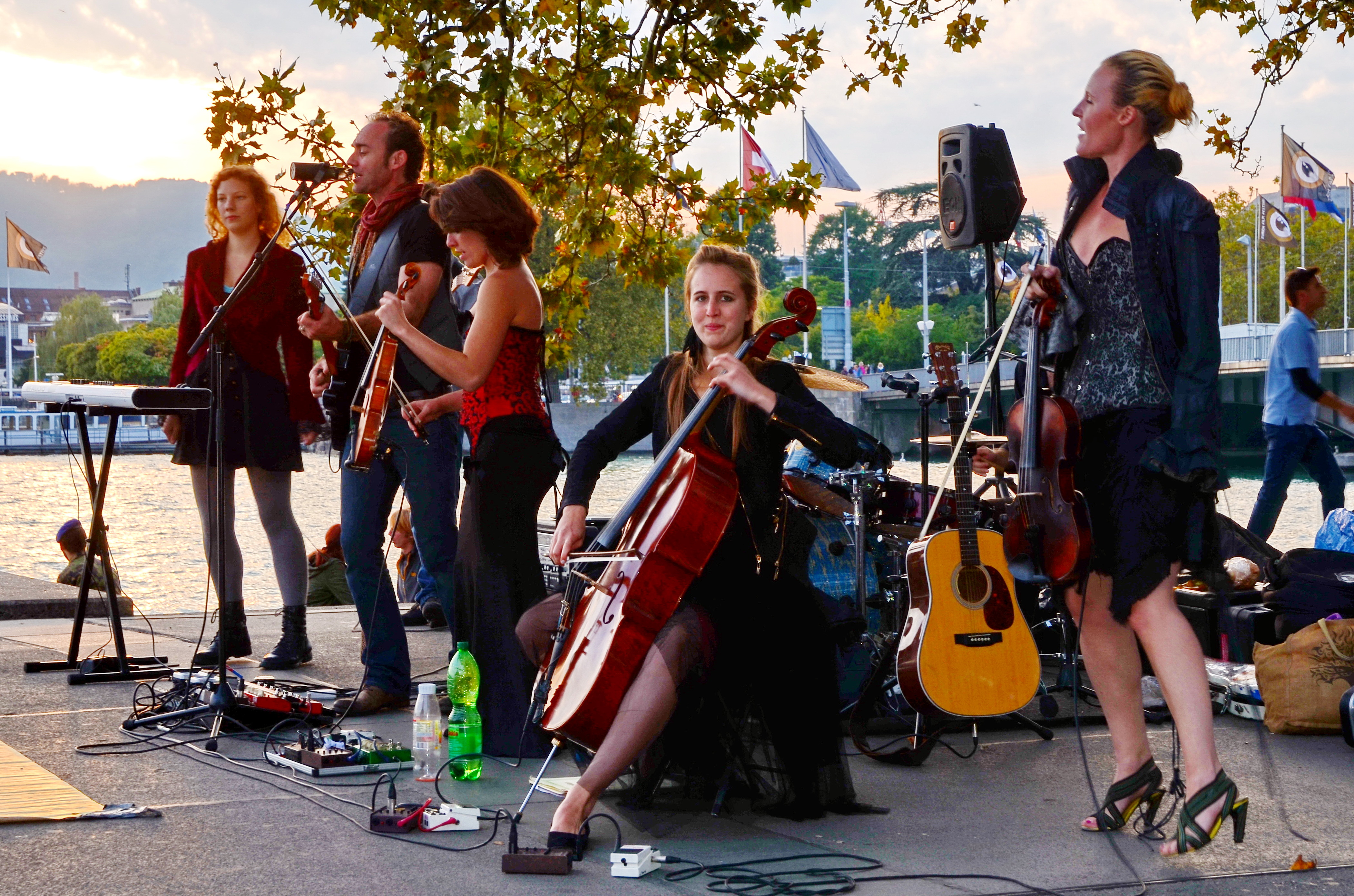 The Wishing Well, Utoquai on Zürichsee lakeshore in Zürich (Switzerland)